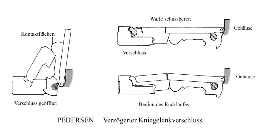 verzögerter Pedersen-Verschluss